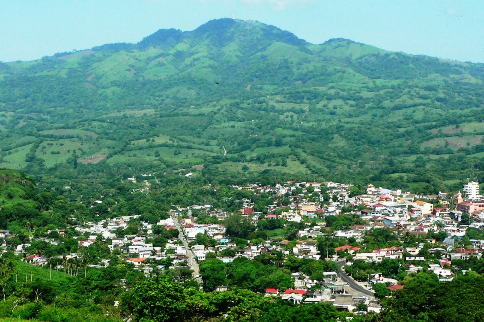 Vista del Cerro La Vigia y de la ciudad de Catemaco, Municipio de Santiago Tuxtla, Veracruz, México.